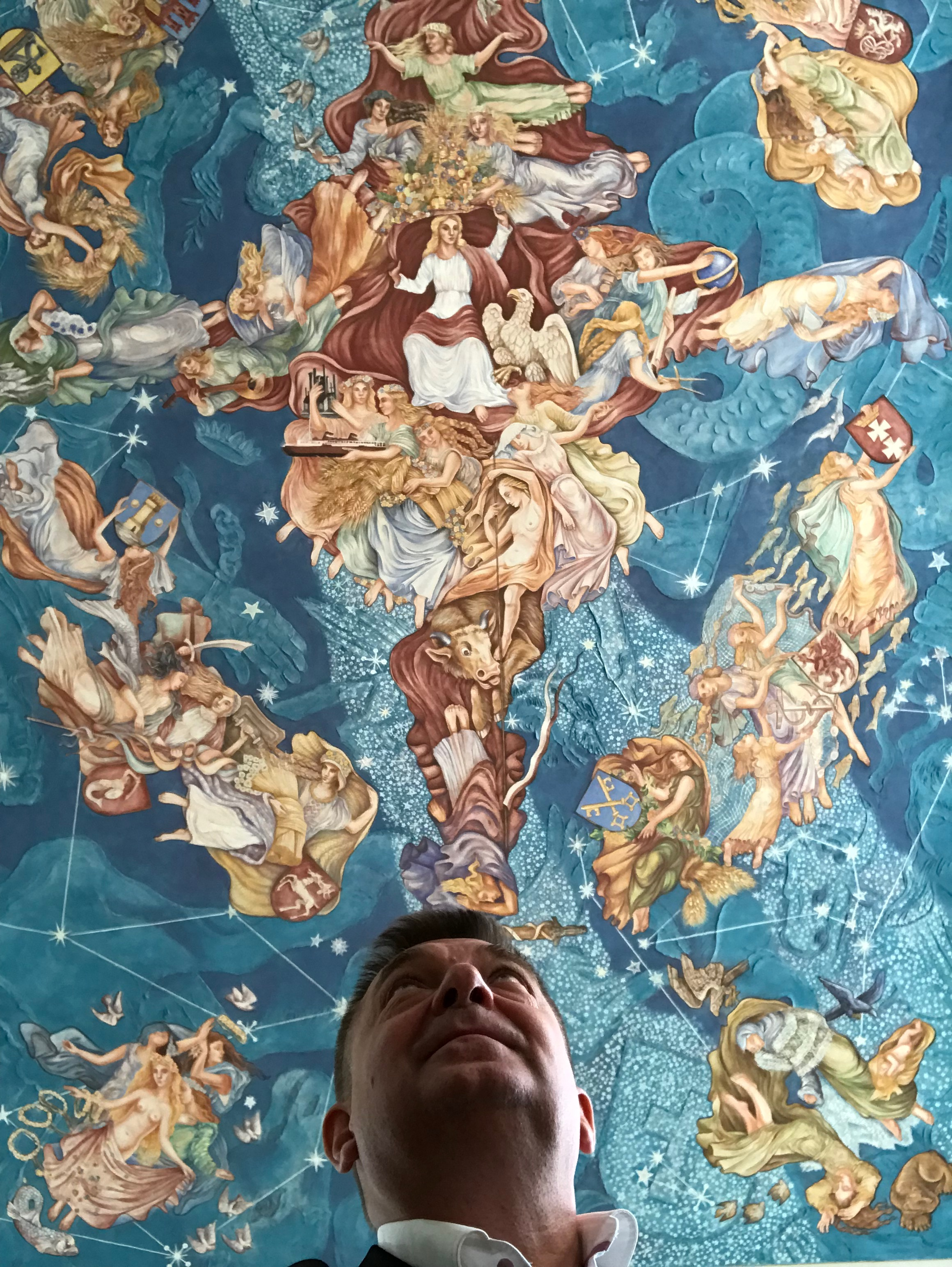 Zrekonstruowany plafon z 1938 r. w Gimnazjum Polskim w Gdańsku.